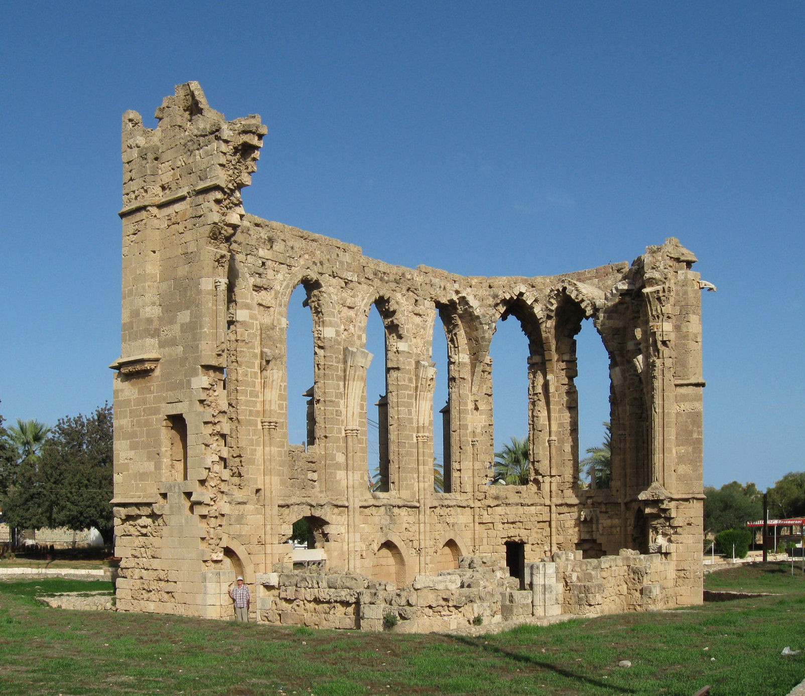 St. Georg-Kirche der Latiner (1302-1307)